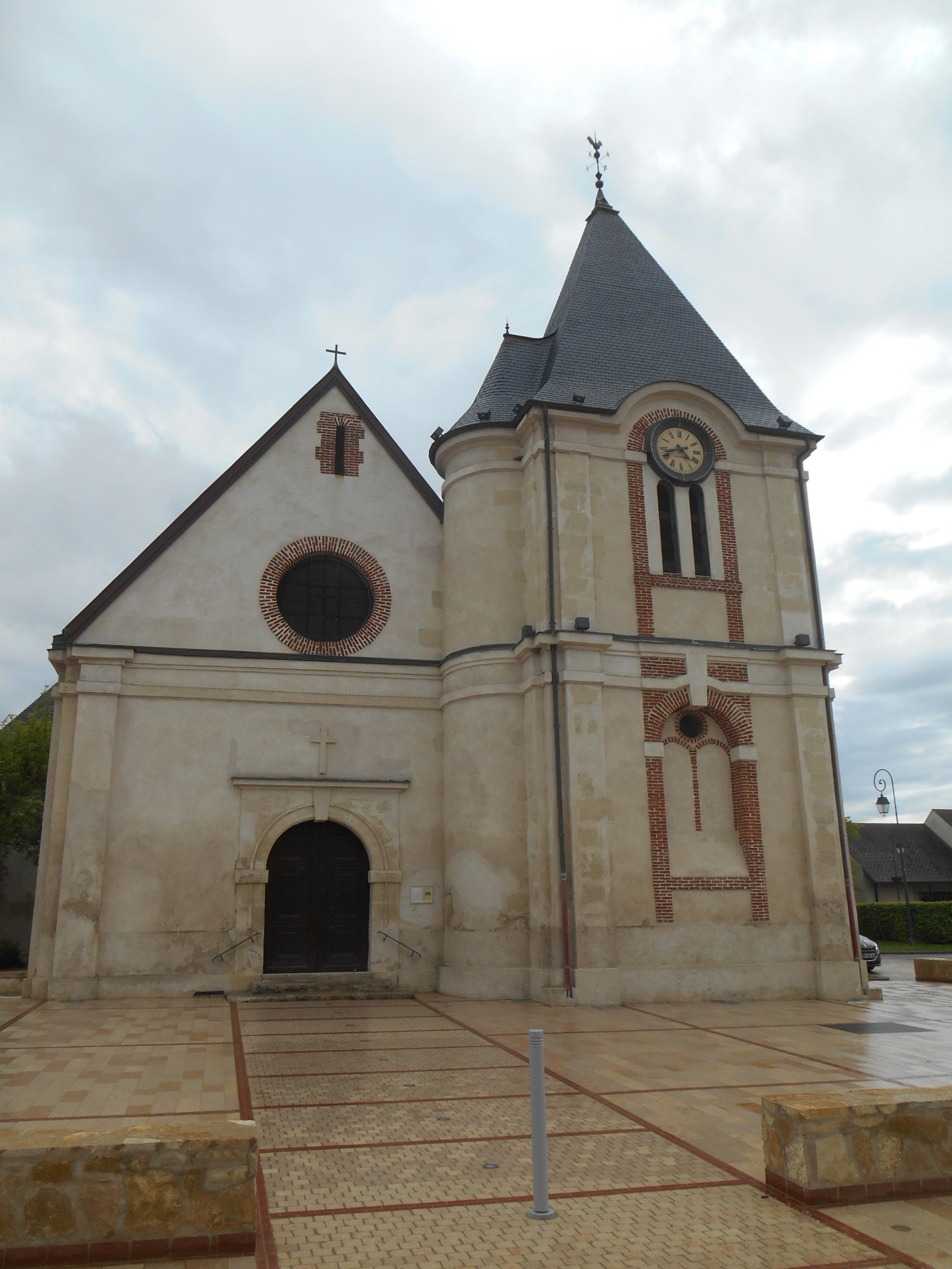 Eglise de Fresnes-sur-Marne (77)